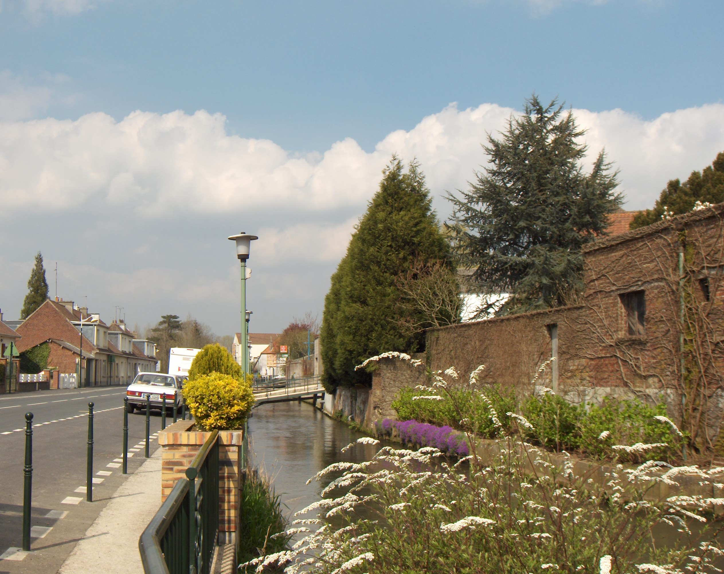 Die Aa zu Fauquembergues (Frankreich, Dept. Pas-de-Calais), links die Straße D928, Blick stromabwärts.